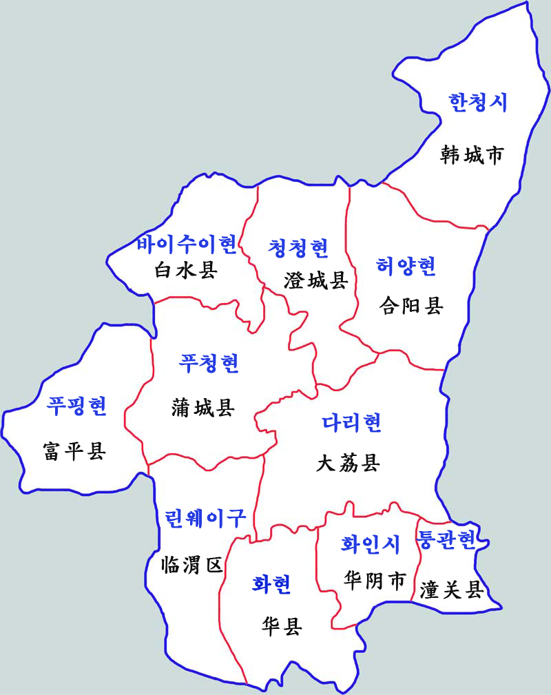 웨이난시 현급행정도